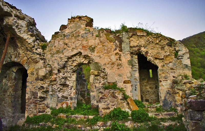 Монастырь Андаберд